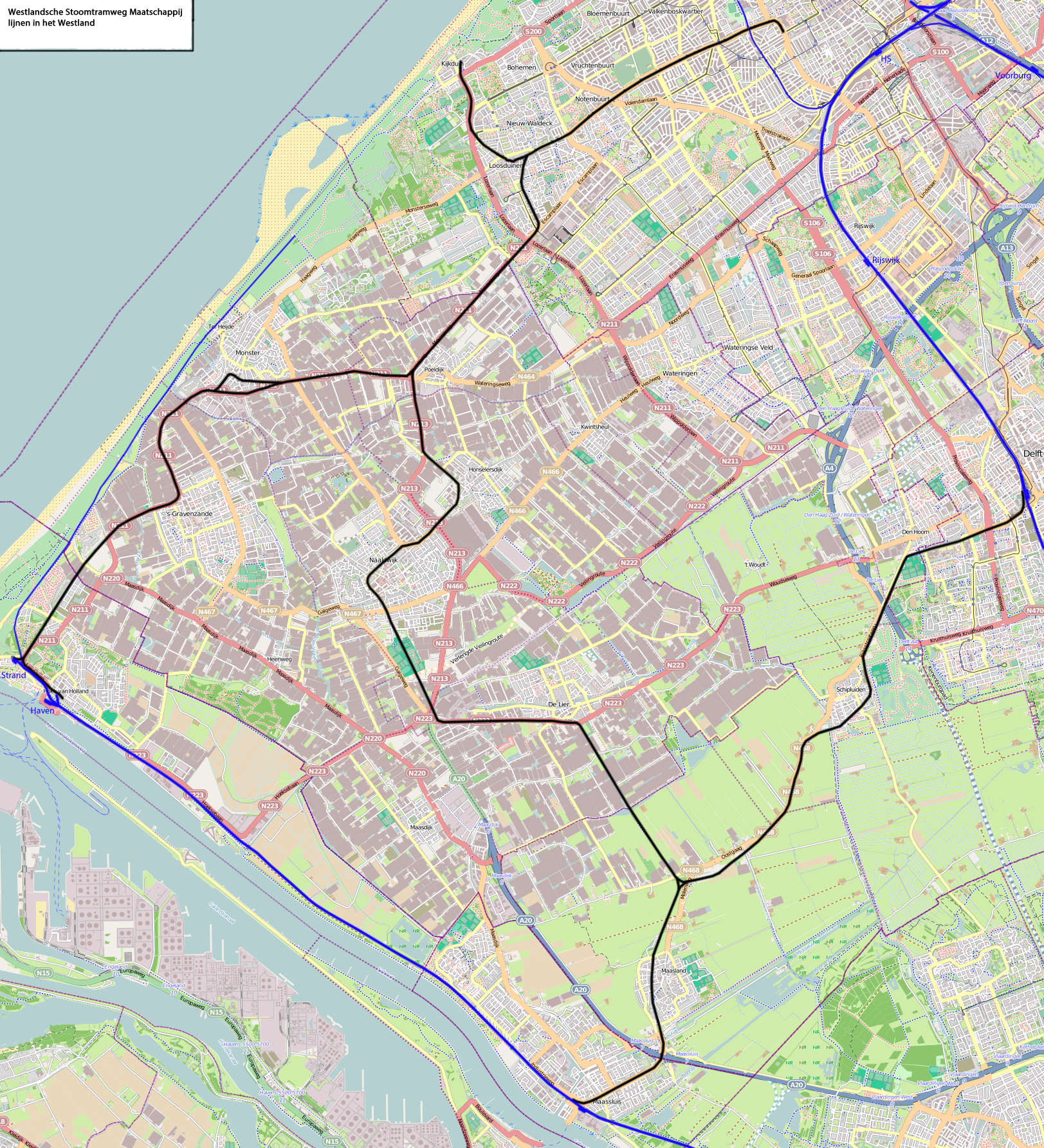 Vroegere WSM lijnen in het zwart op een Openstreetmap achtergrond.